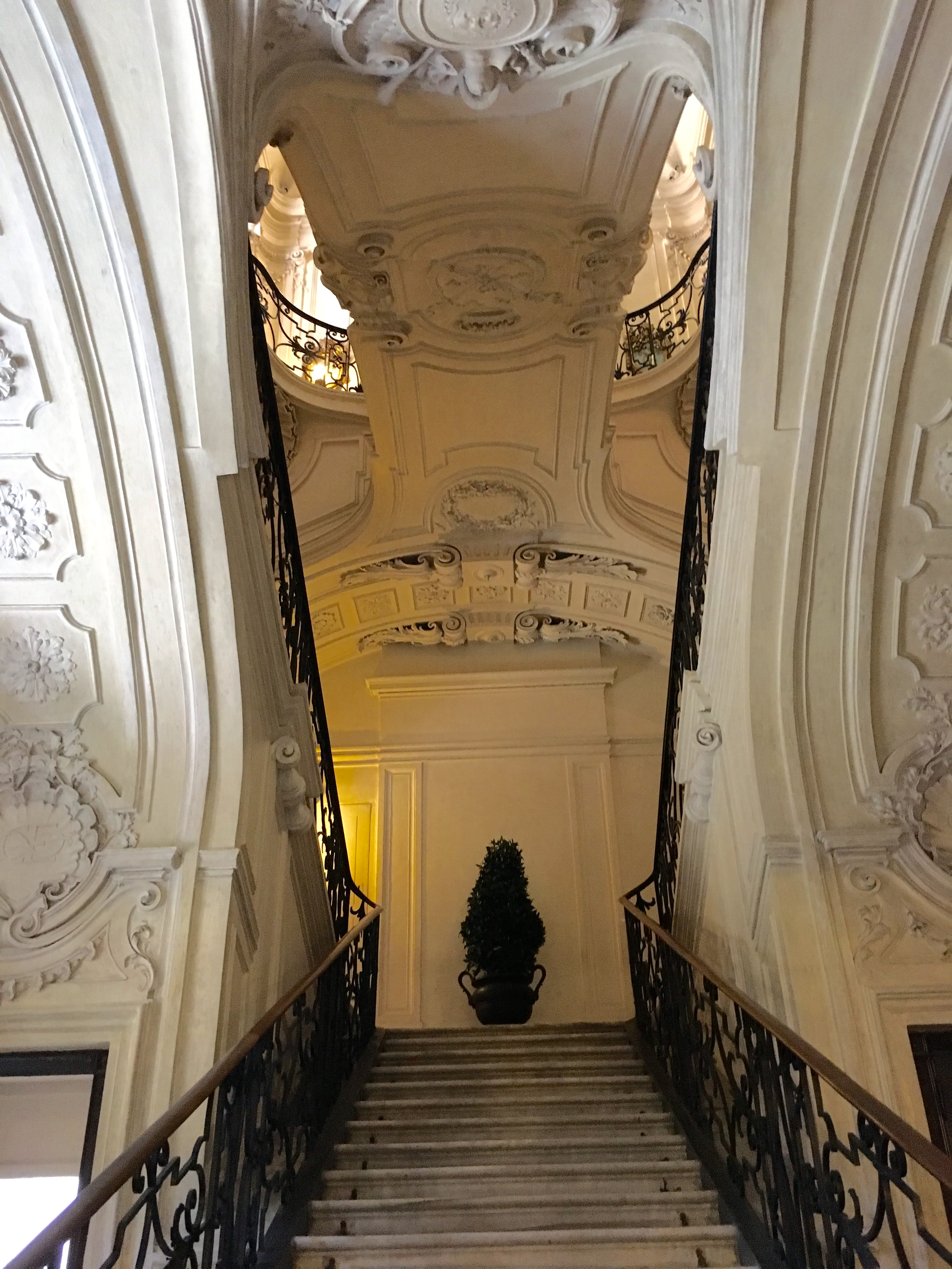 Scalone delle forbici. Palazzo reale Torino